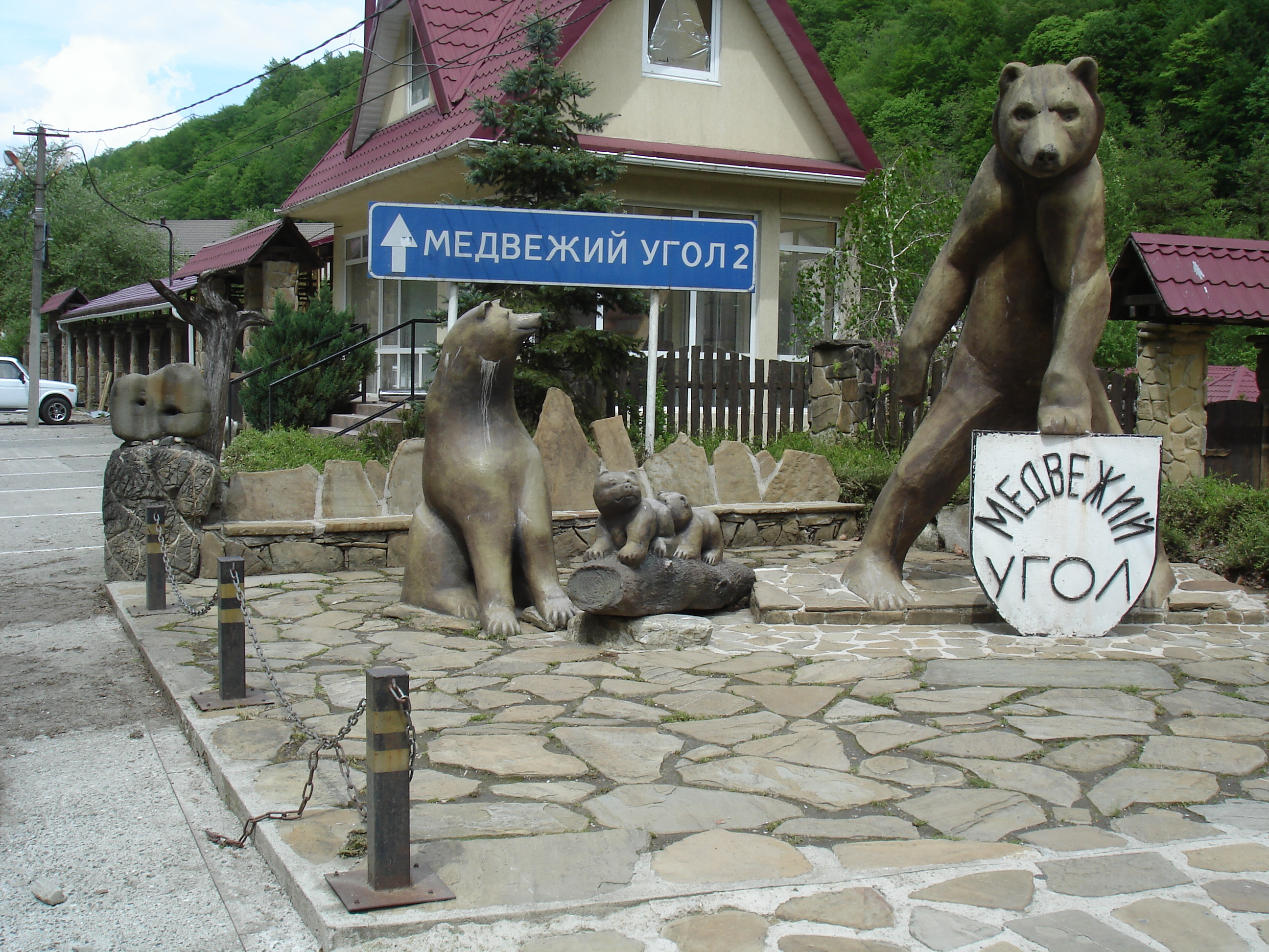 Чвижепсе, указатель на Медвежий угол